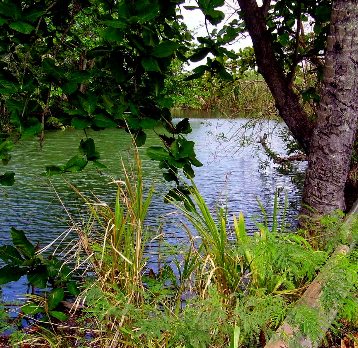 Camuy, 00627, Puerto Rico